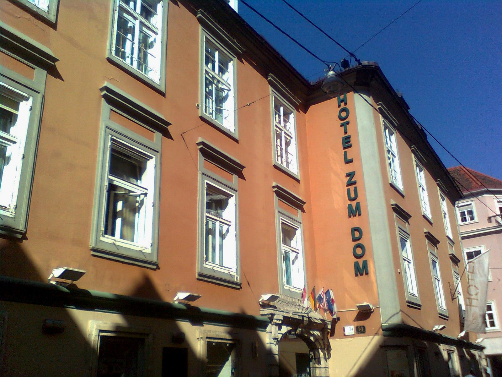 Palais Inzaghi, Graze, Bürgergasse, heute Hotel zum Dom